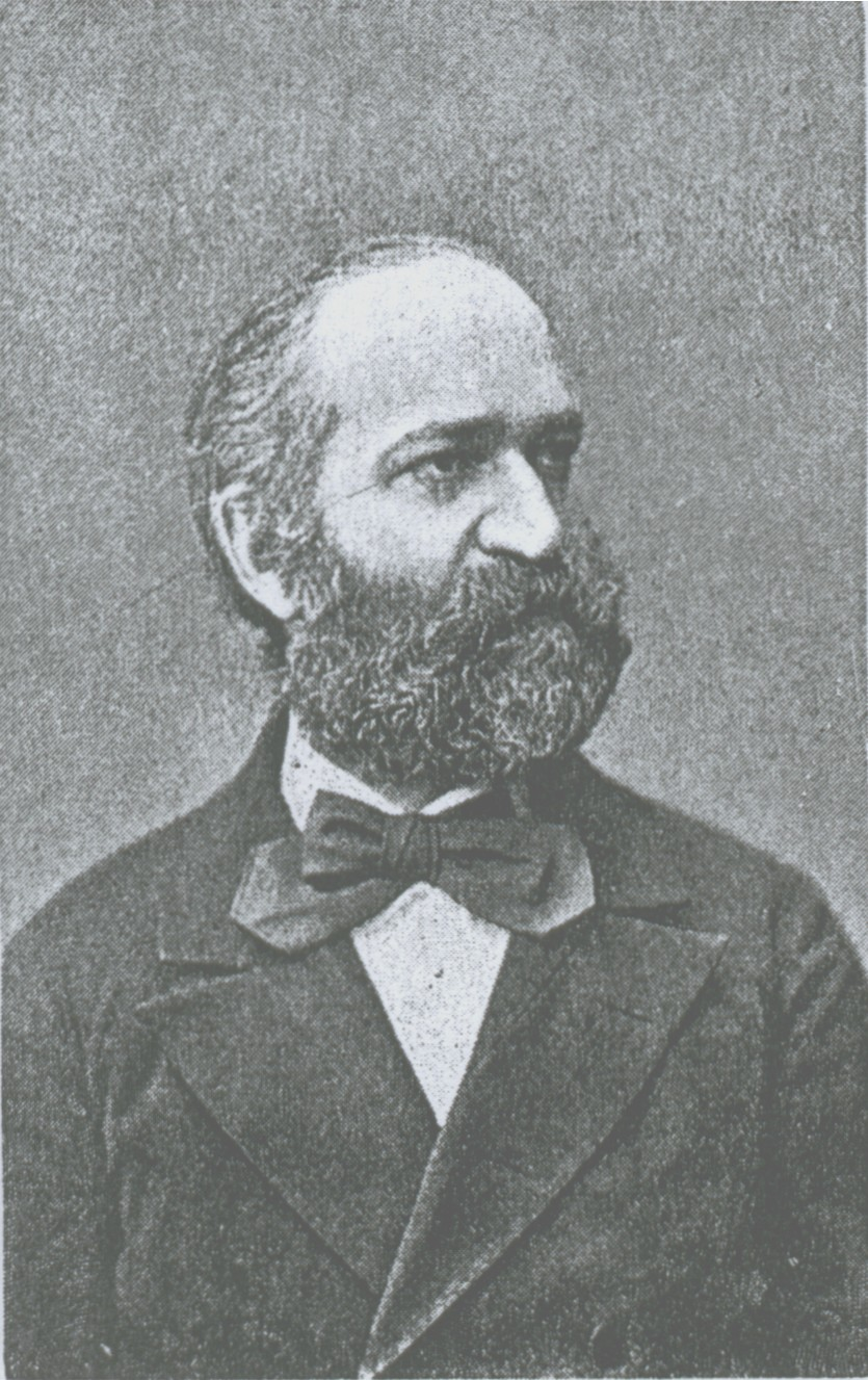 Ferdinand Thieriot (1838-1919) deutscher Komponist Bild von vor 1906